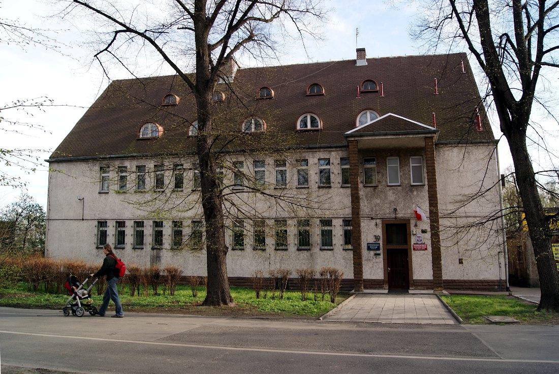 Budynek nr 39 w którym mieści się Regionalny Zarząd Gospodarki Wodnej we Wrocławiu oraz Hydroprojekt Wrocław Sp. z o.o.